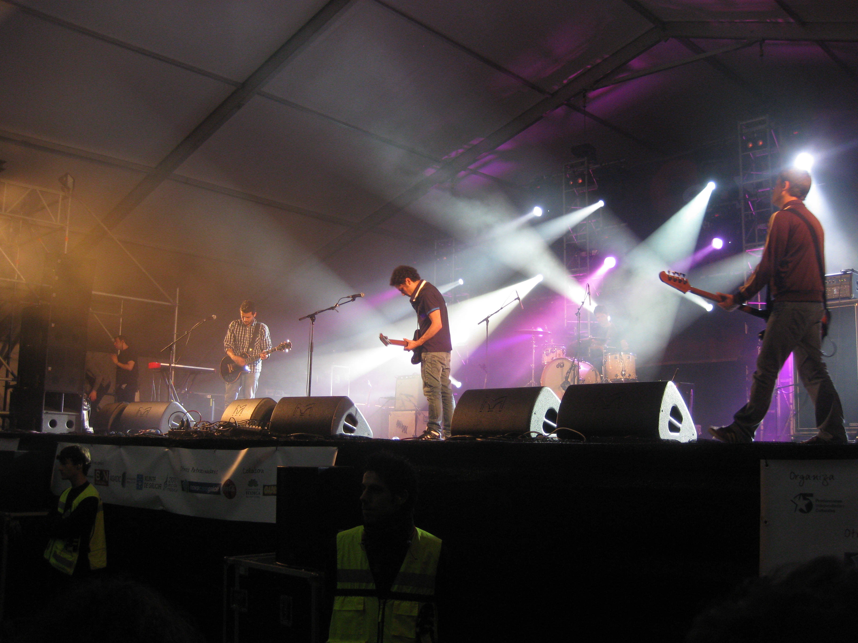 A banda Sexy Sadie no Festival do Norte 2011, en Vilagarcía de Arousa.